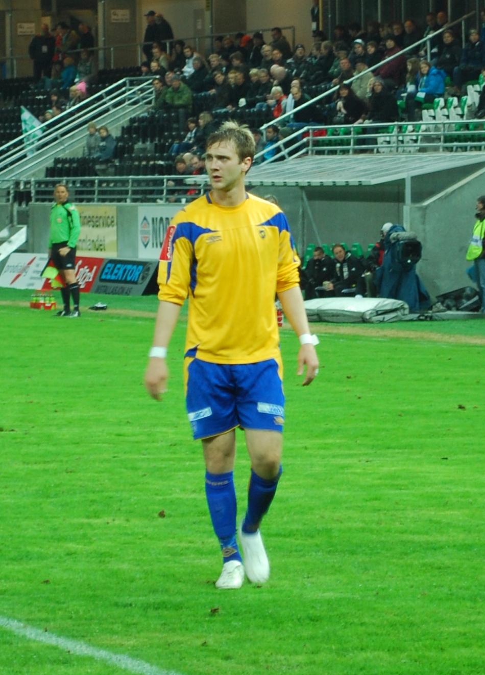 Jay Needham, amerikansk fotballspiller hos Alta IF.